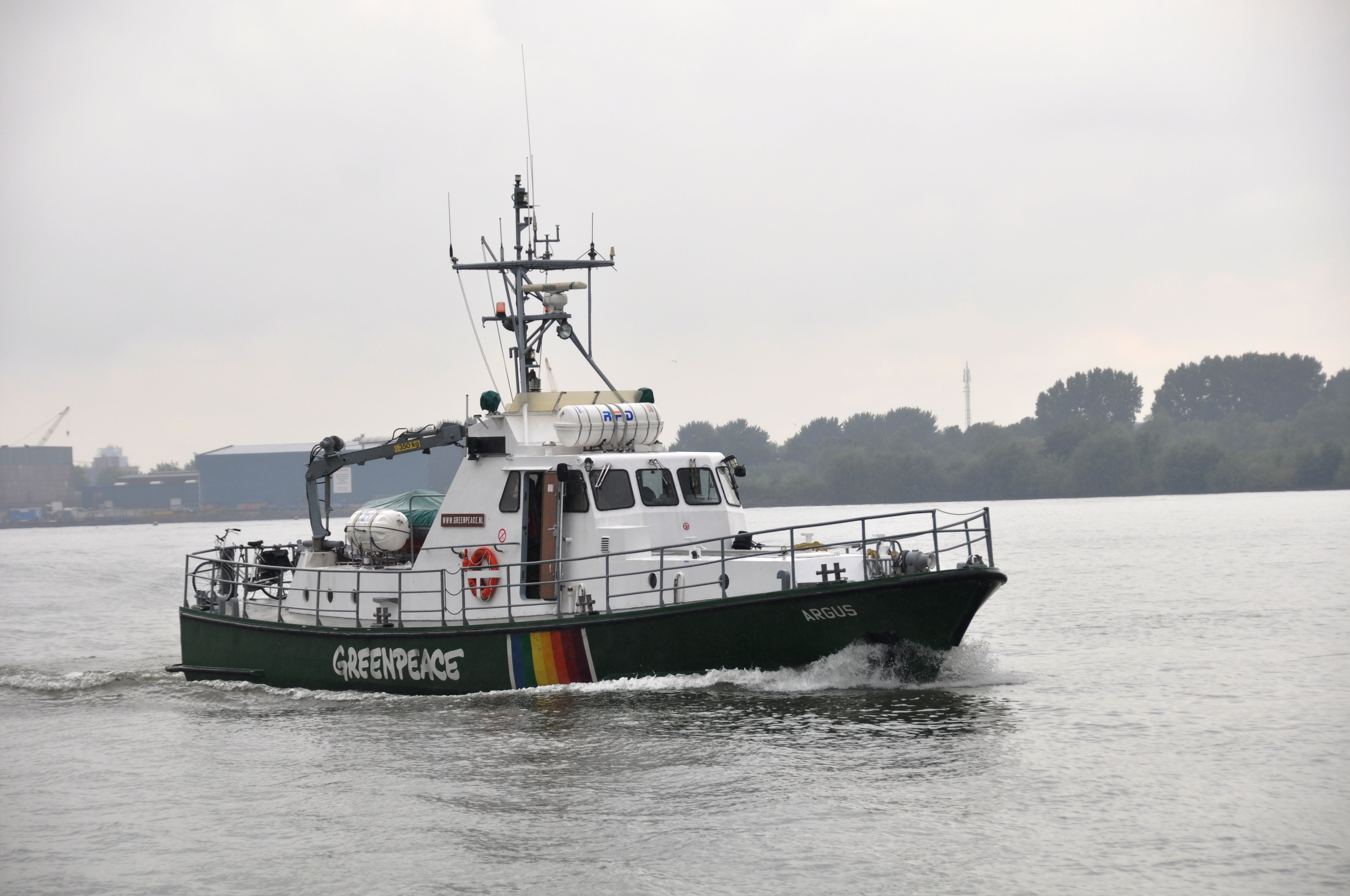 De ARGUS van Greenpeace opvarend op de Nieuwe Maas.